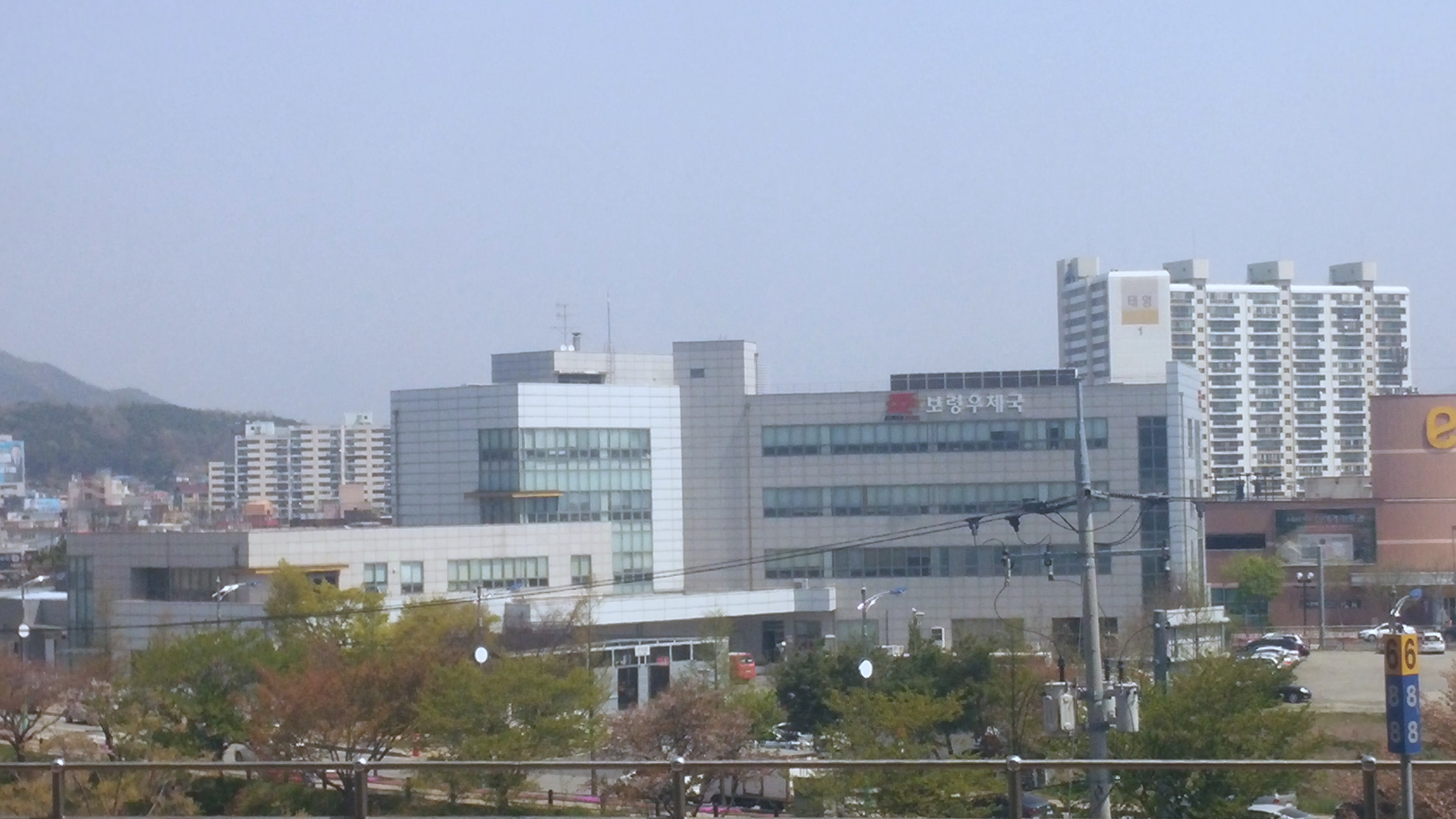 보령우체국 원경.